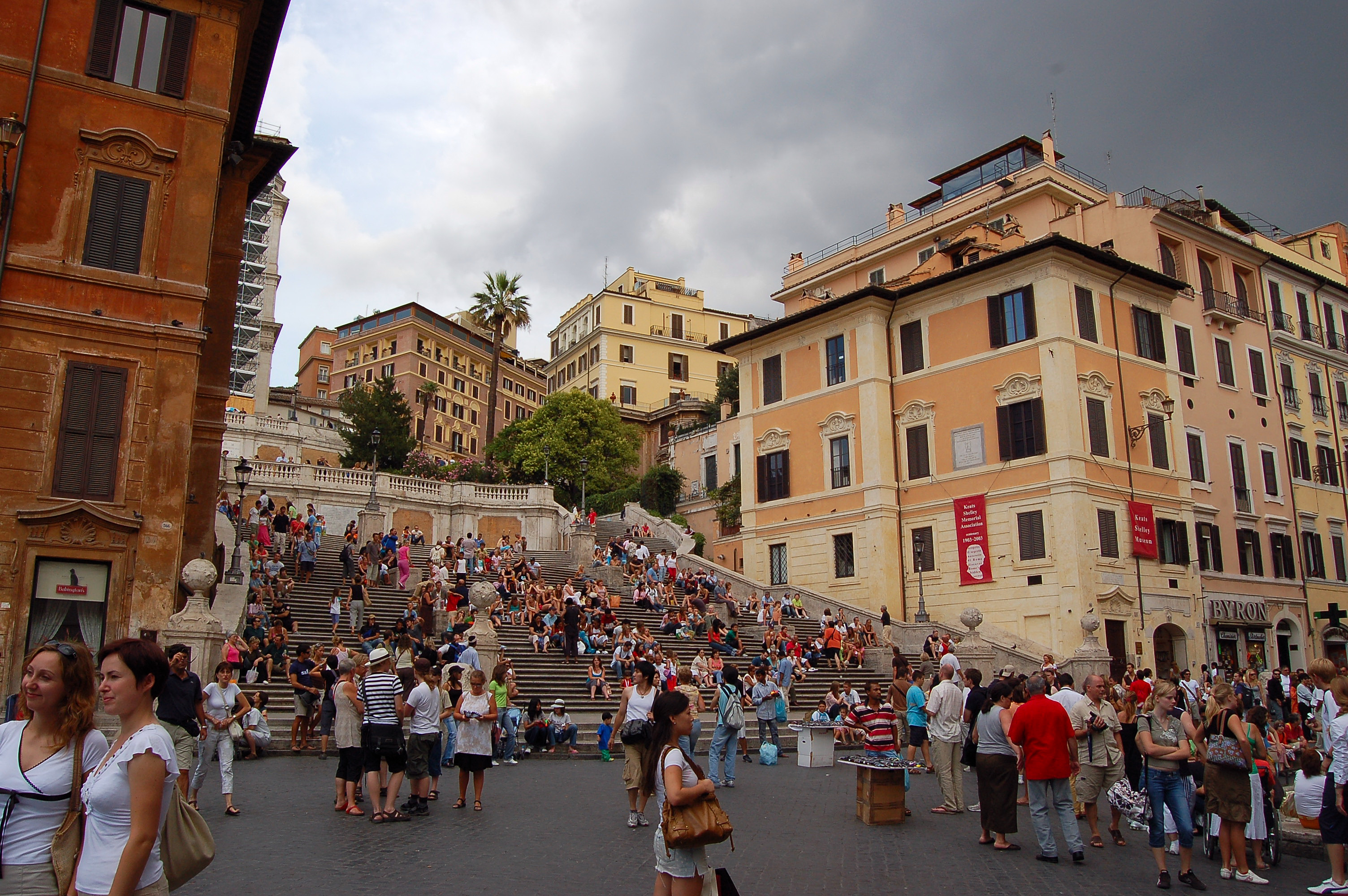 Roma - Piazza di Spagna